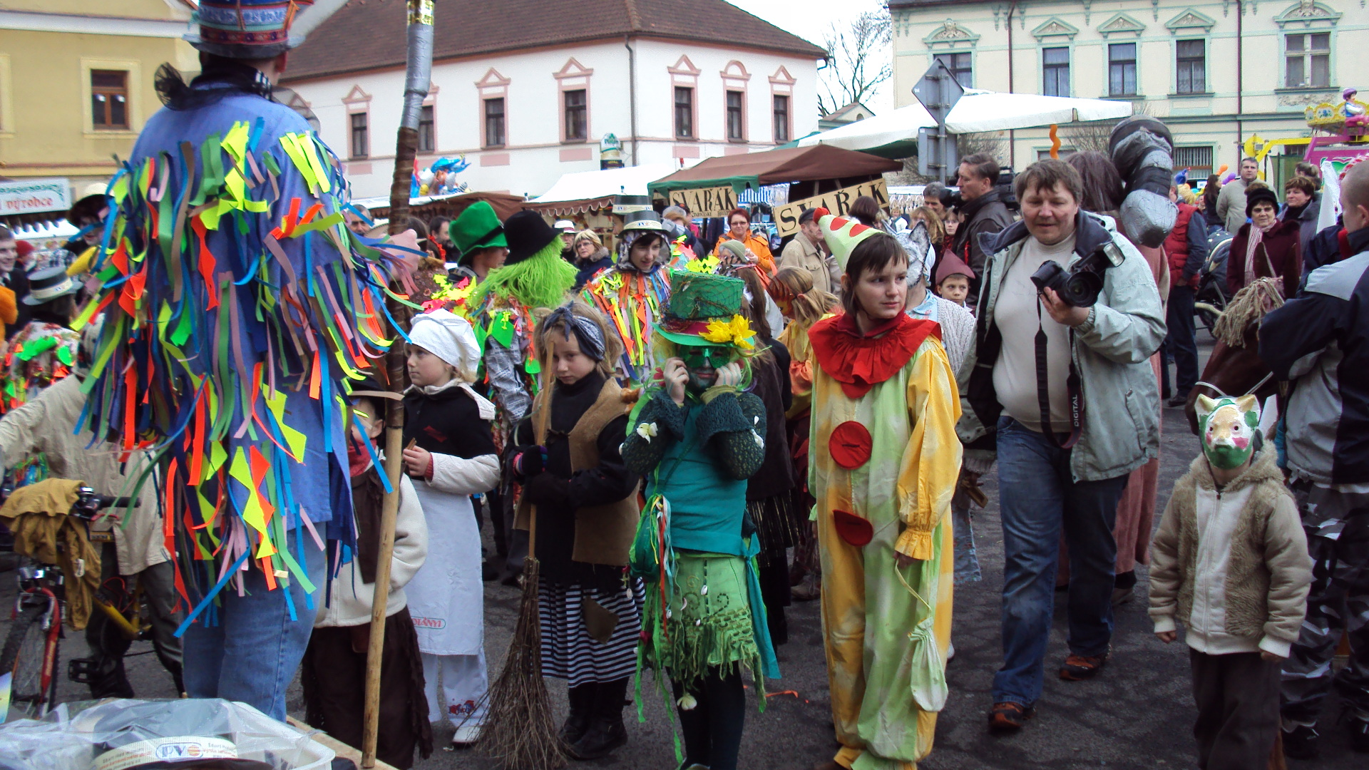 Česky: Karneval na zákupském náměstí